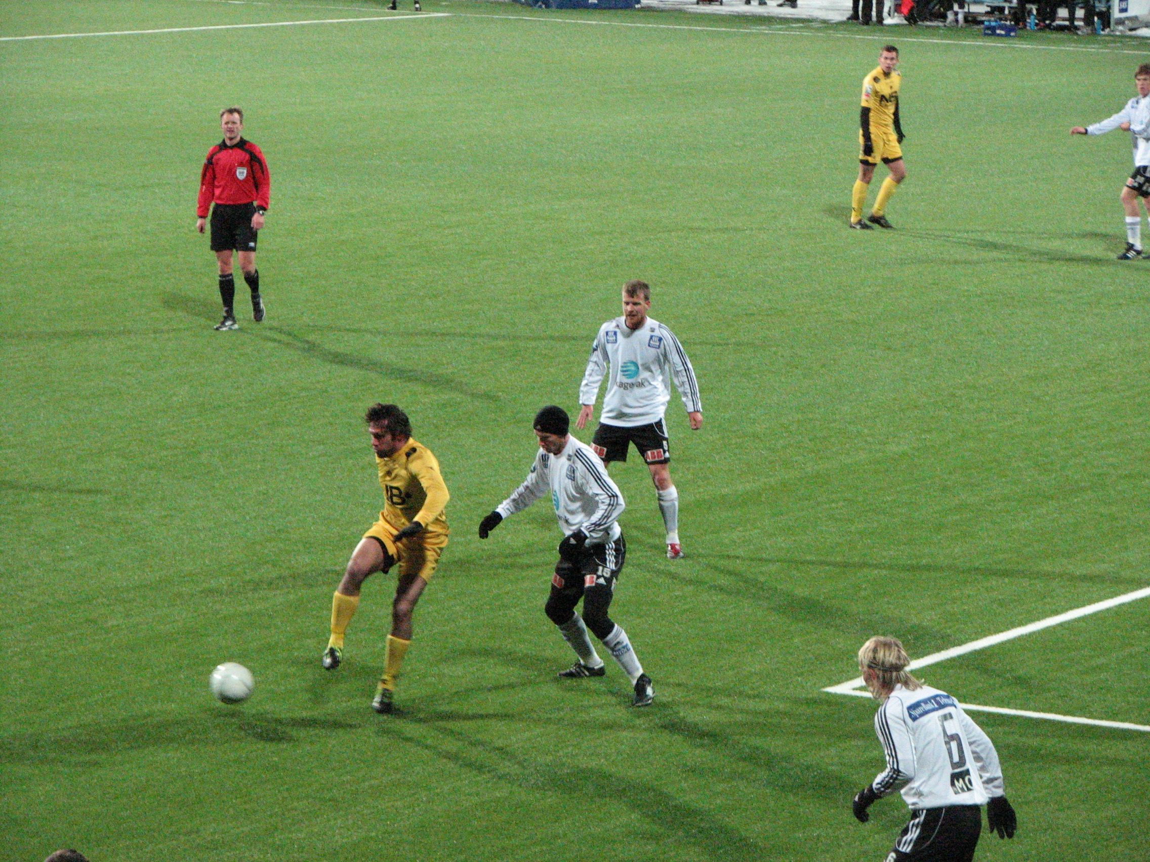 Tippeligakvalifiseringen mellom Bodø/Glimt og Odd Grenland. ballmottak